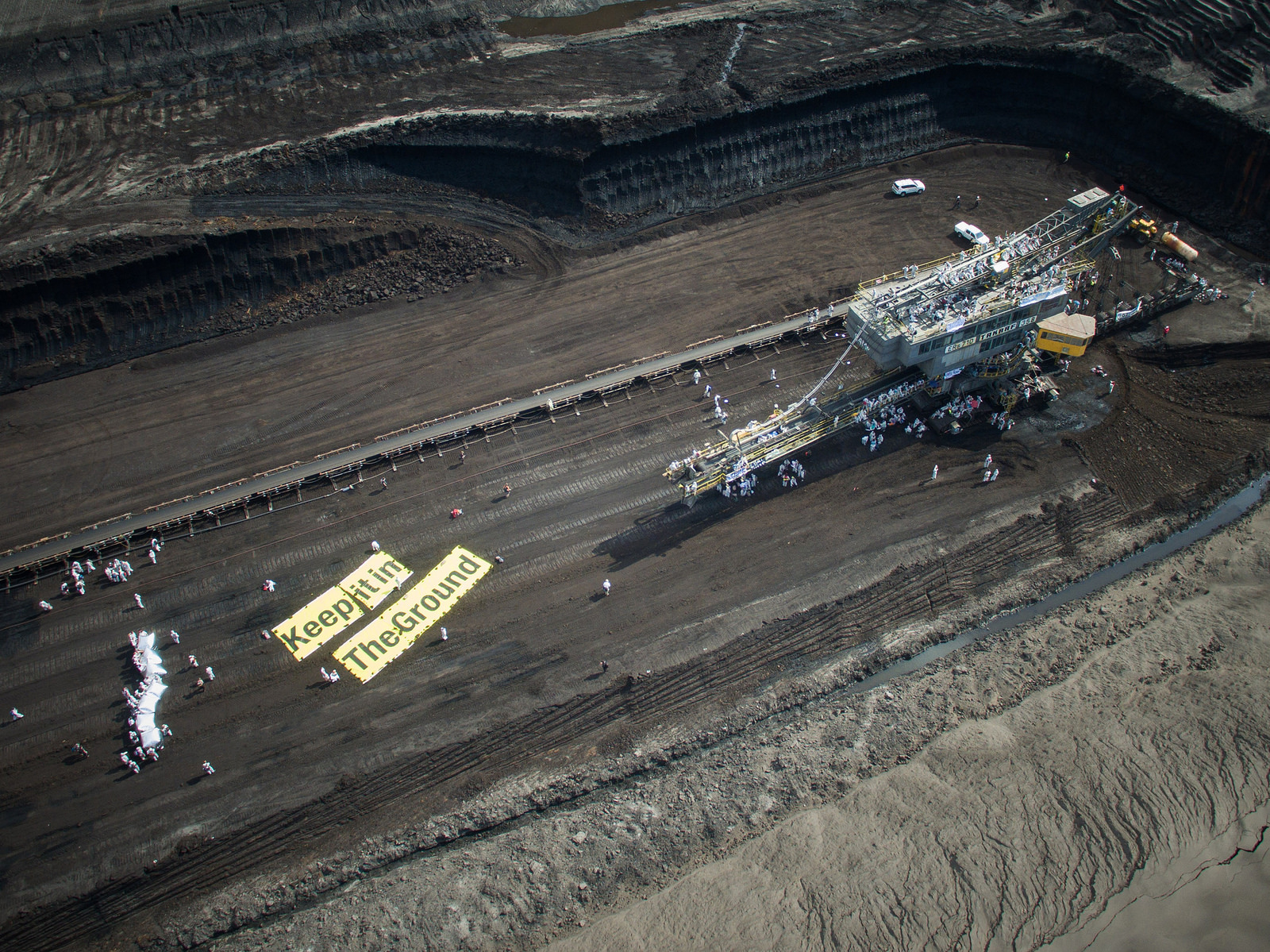 Blick auf den Tagebau Welzow Süd mit Ende Gelände Transparent "Keept it in the ground".